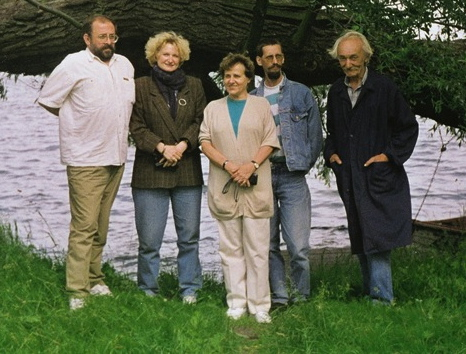 Ekipa prowadząca wykopaliska na Lednicy.